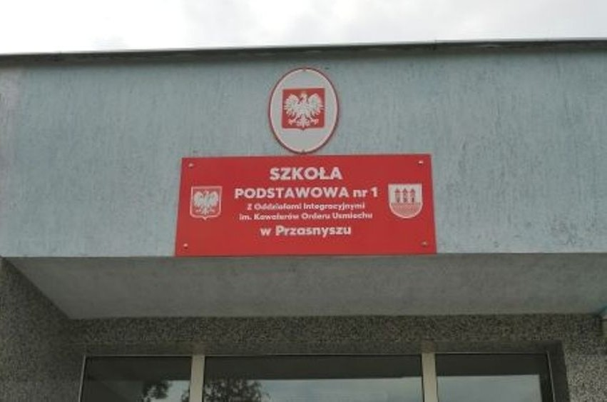 Przasnysz. Tablica Szkoły Podstawowej nr 1